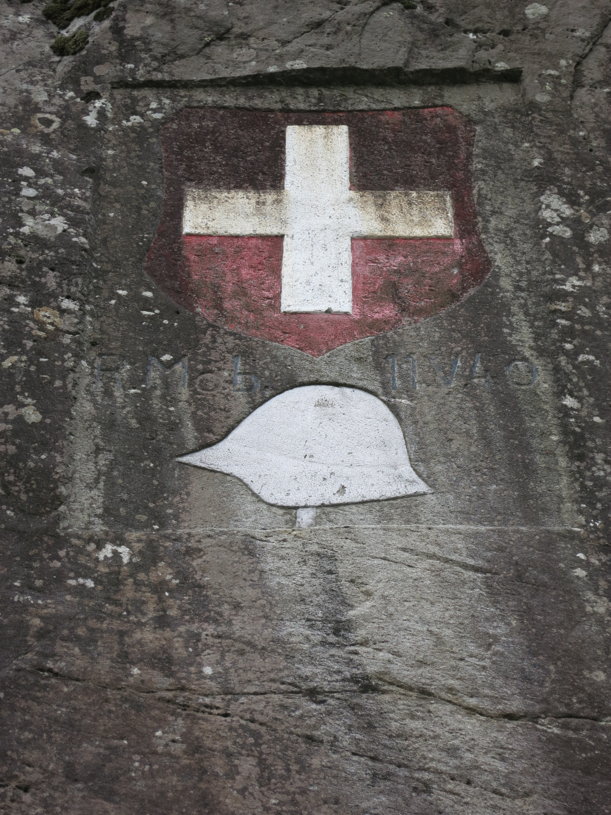 Sperrstelle Simplonachse VS, Schweiz